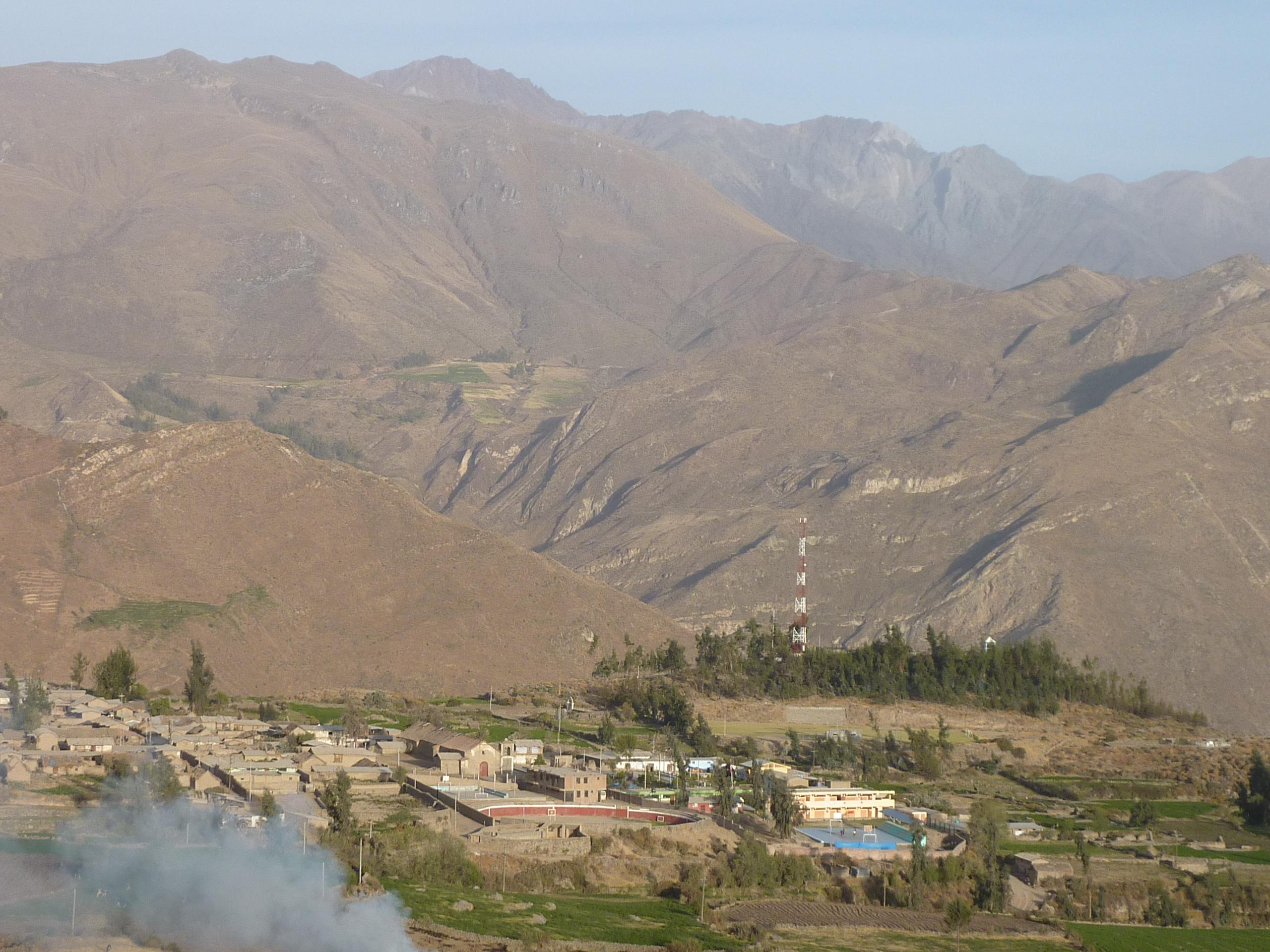 Plaza de Toros de Machaguay (vista desde la carretera)